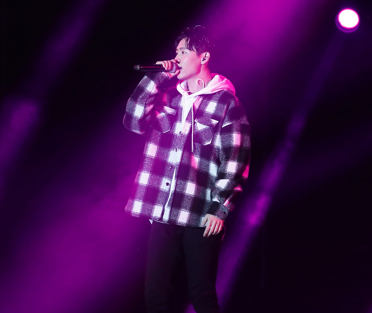 2017.3.25 红星美凯龙群星演唱会 魏晨